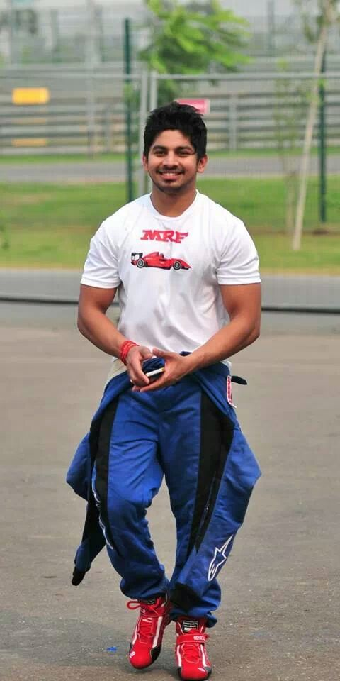 Ashwin Sundar